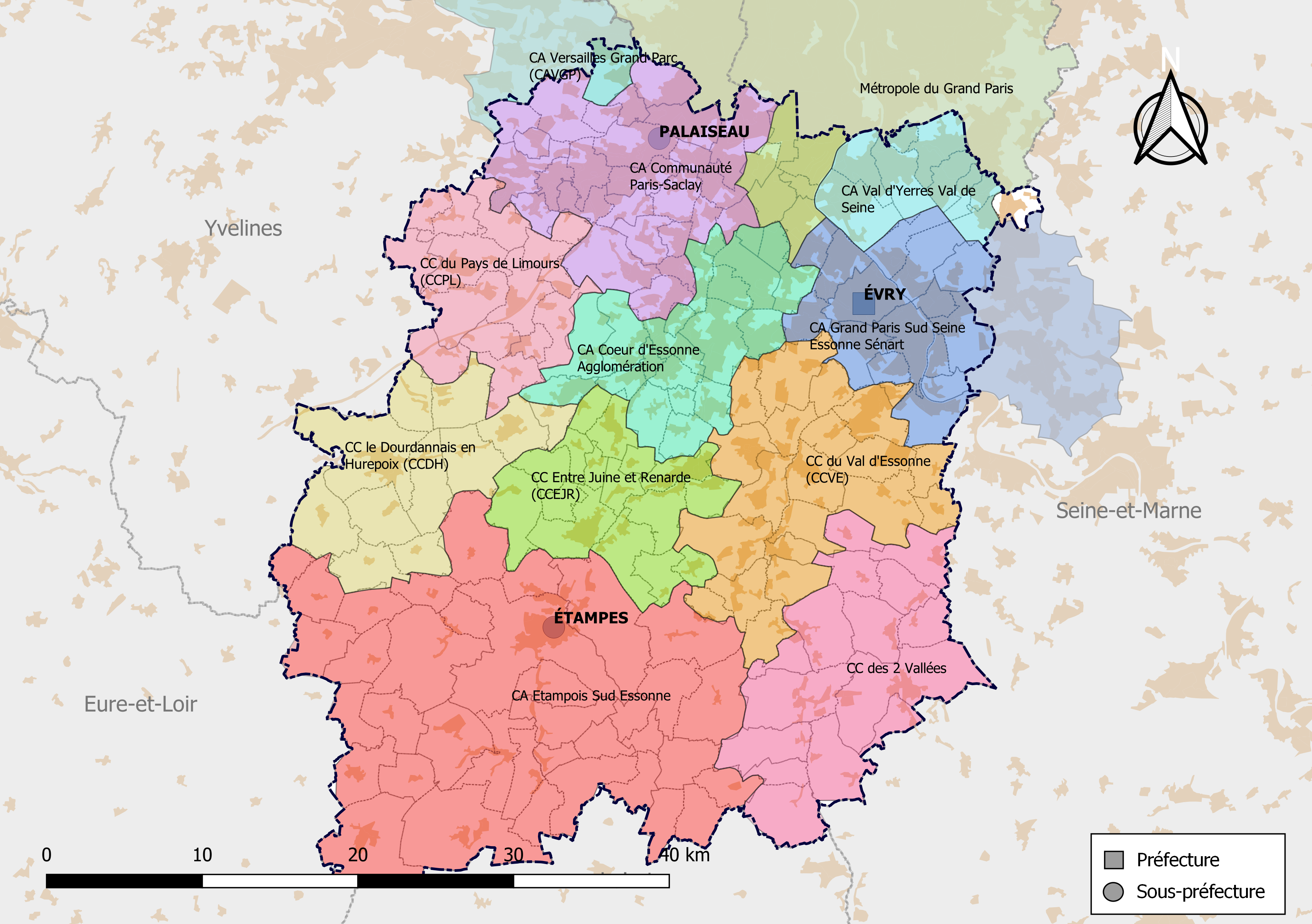 Carte des intercommunalités du département de l'Essonne, France. Composition au 1er janvier 2019.